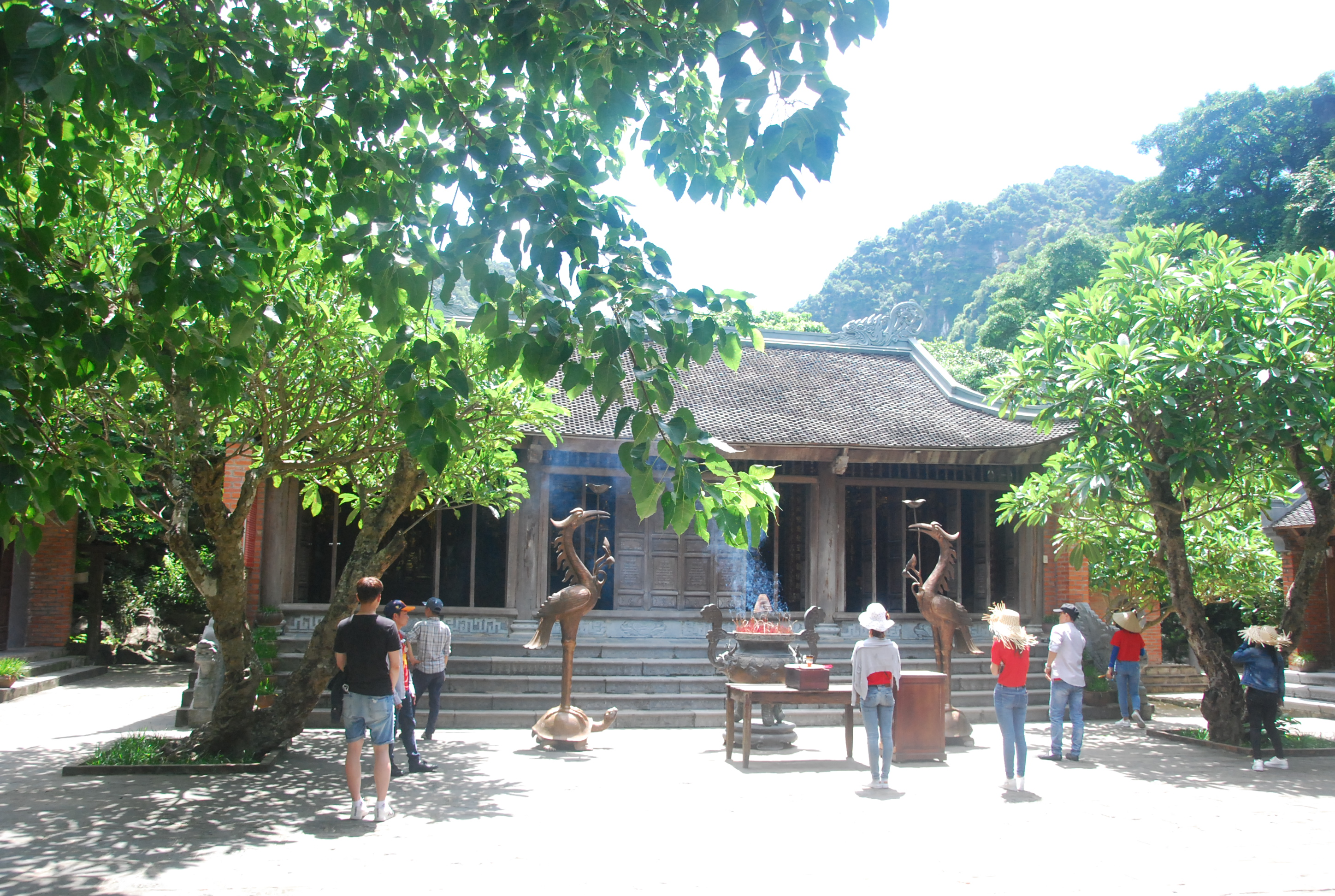 Phong cảnh khu du lịch sinh thái Tràng An ở Ninh Bình